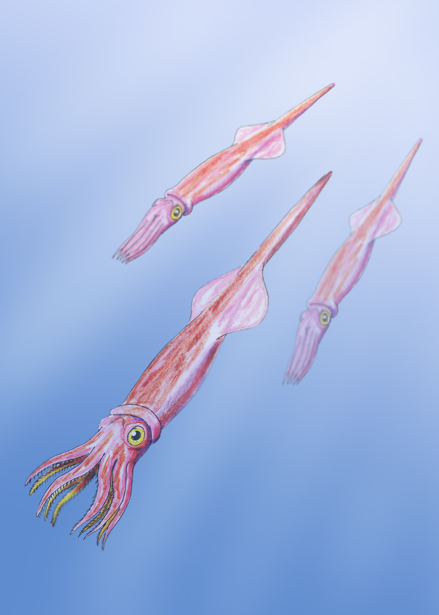 Belemnite